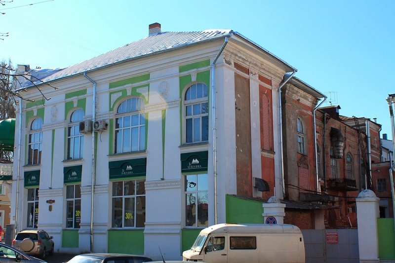 Будынак крэдытнага таварыства